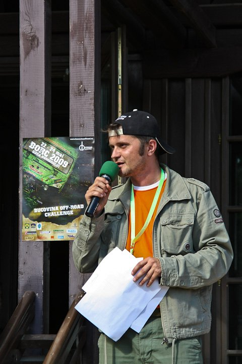 Rasty Petzalis, organizatorul Bucovina Off-Road Challenge, considerat cel mai dur concurs off-road din România